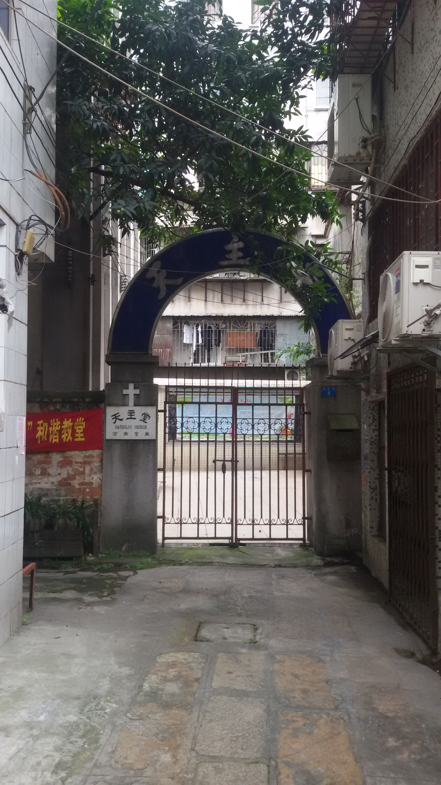 粵語: 河南寶崗天主堂